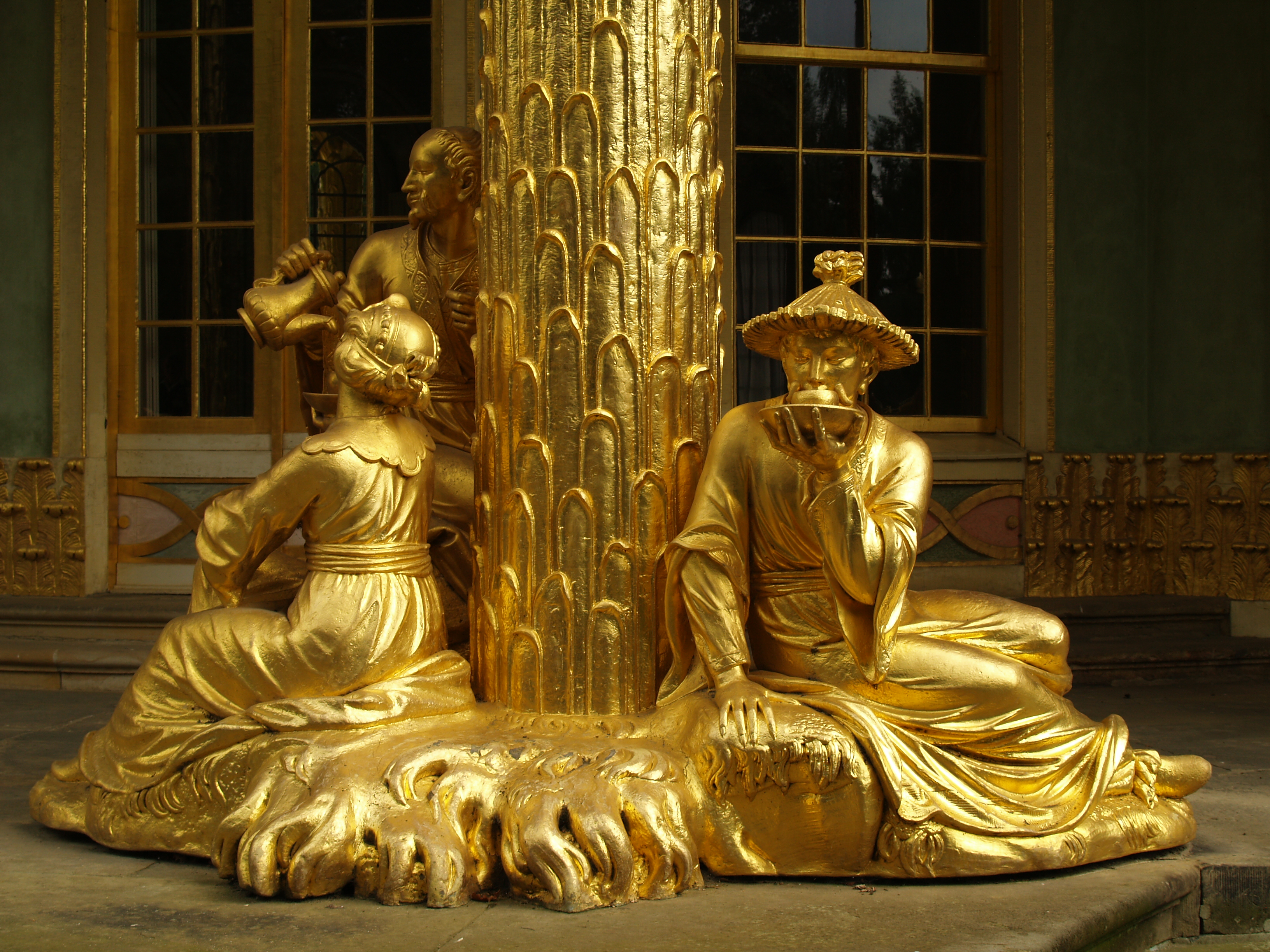 Potsdam, parque de Sanssouci, Casa china.